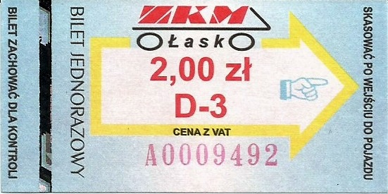 Bilet jednorazowy ulgowy na linię D do Pabianic